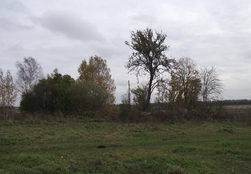 Karaliūnų kaimo senosios kapinės